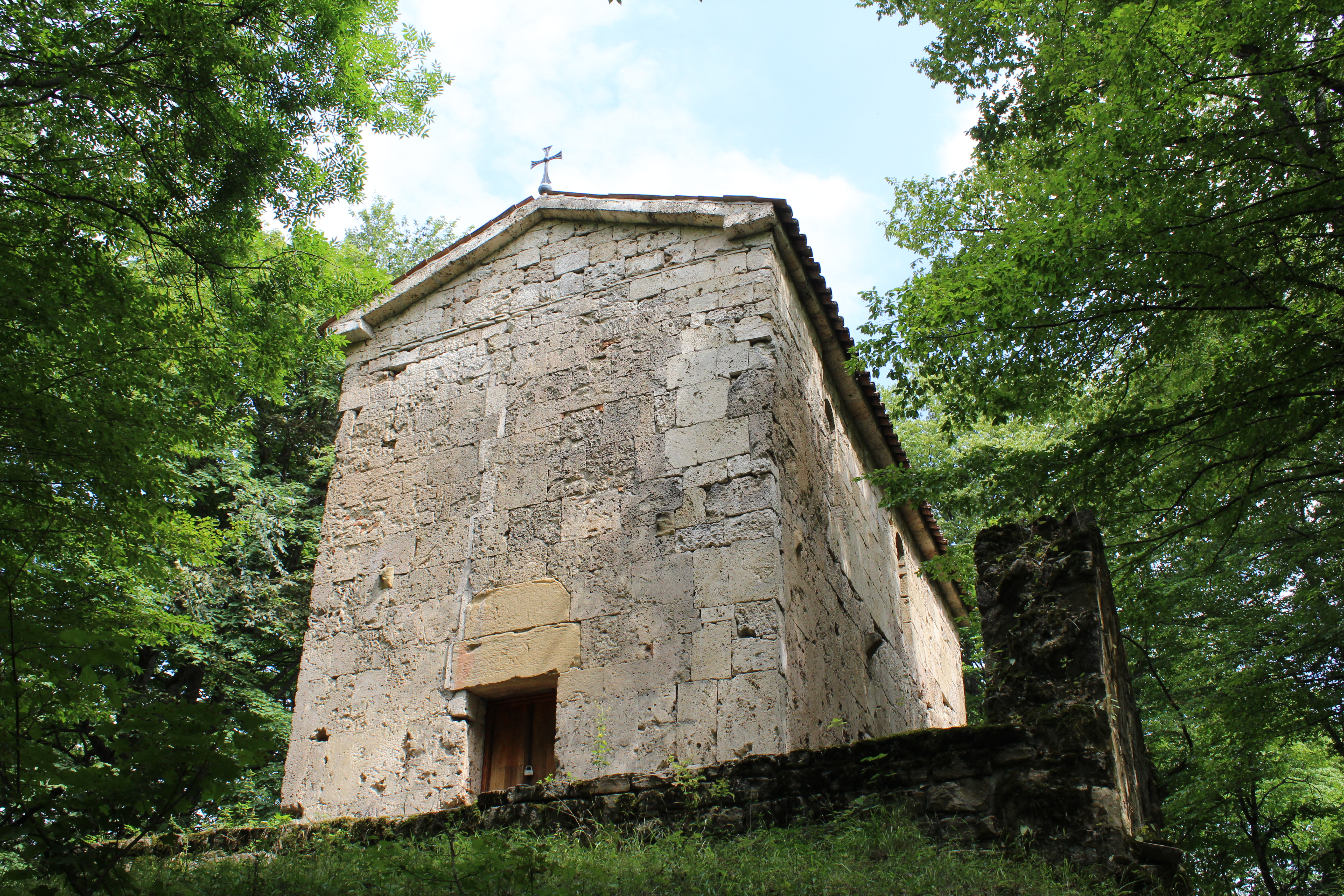 წვეროდაბალის წმინდა გიორგის ეკლესია